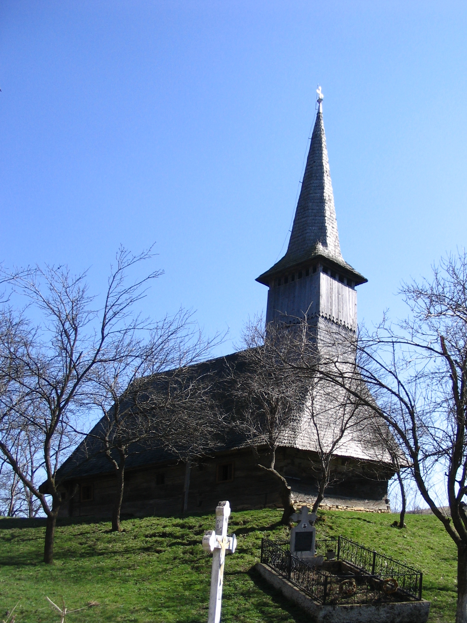 Biserica de lemn din Solomon, judeţul Sălaj. Autor: Bogdan Ilieş Data: mai 2006